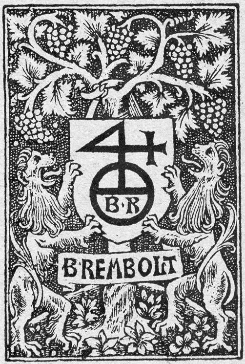 Marque de Berthold Rembolt